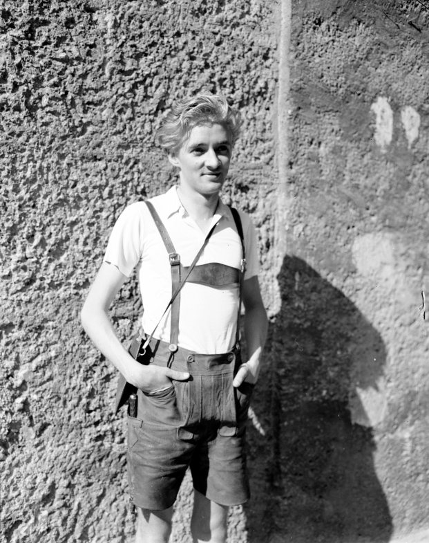 Oskar Werner an einer Mauer beim Salzburger Festspielhaus.